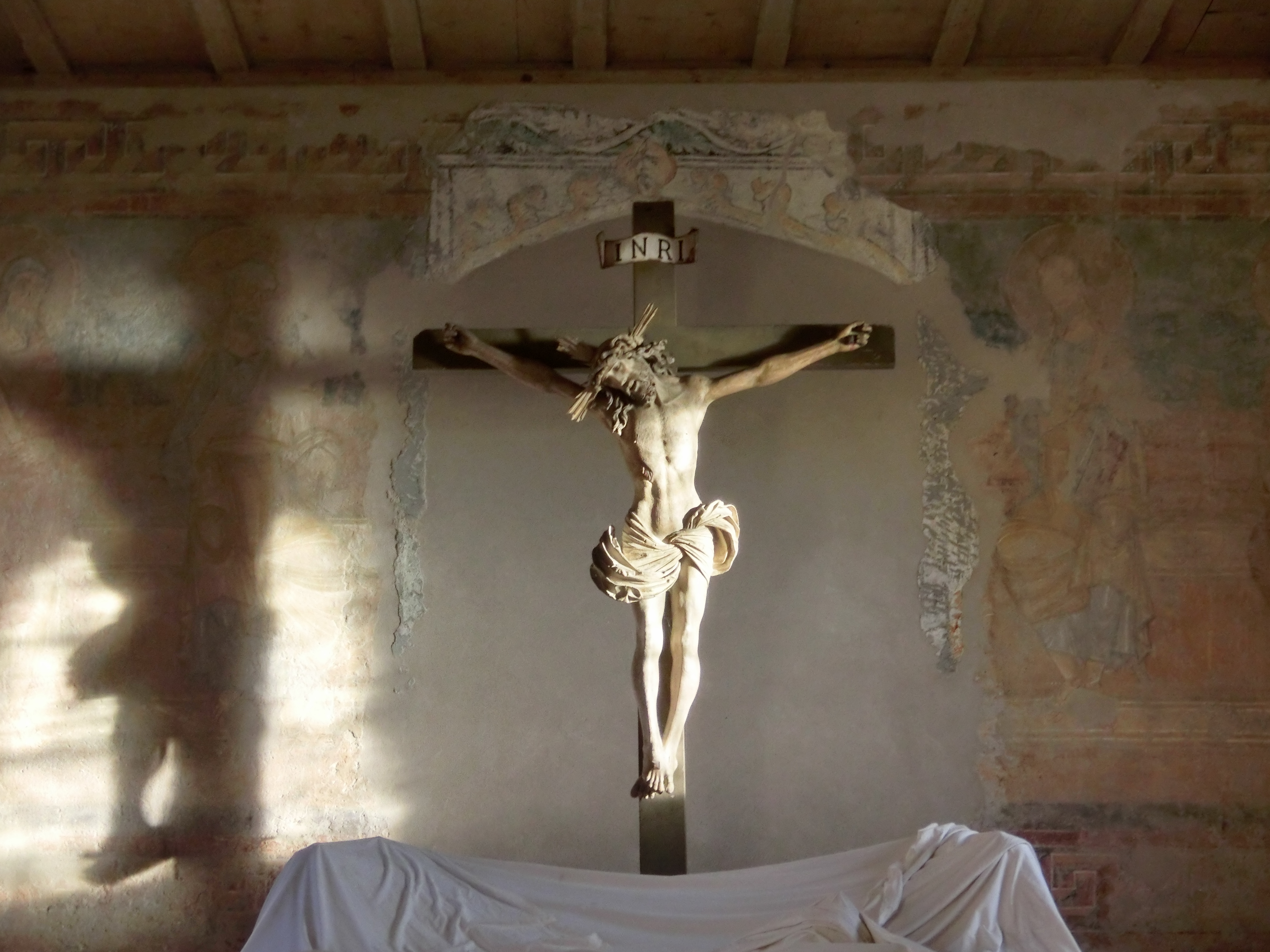 Deutschland - Baden-Württemberg - Bodenseekreis - Überlingen - Goldbach: Sylvesterkapelle